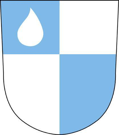 Coat of arms of Väike-Maarja vald, Estonia